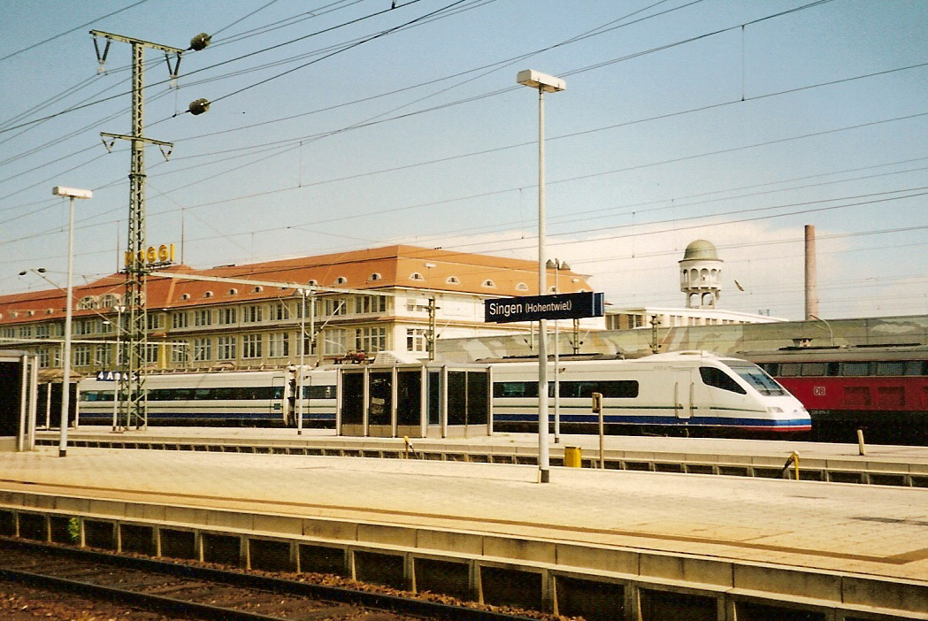 Ein „Cisalpino“ von Mailand nach Stuttgart beim Zwischenhalt und Fahrtrichtungswechsel im Bahnhof Singen (Hohentwiel).